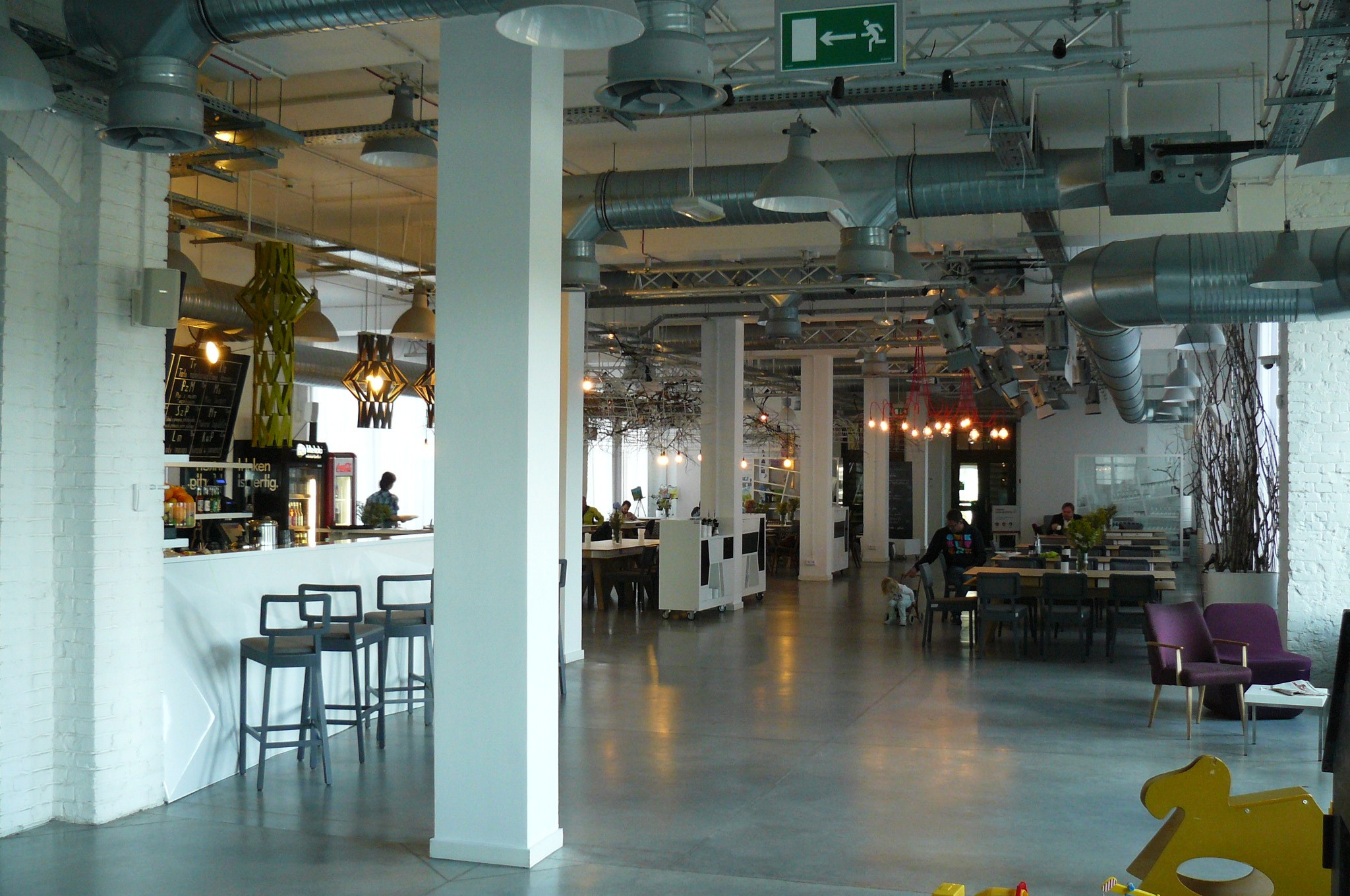 Centrum kultury i restauracja Concordia w Poznaniu.